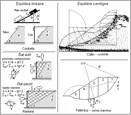 Equilibres plastiques